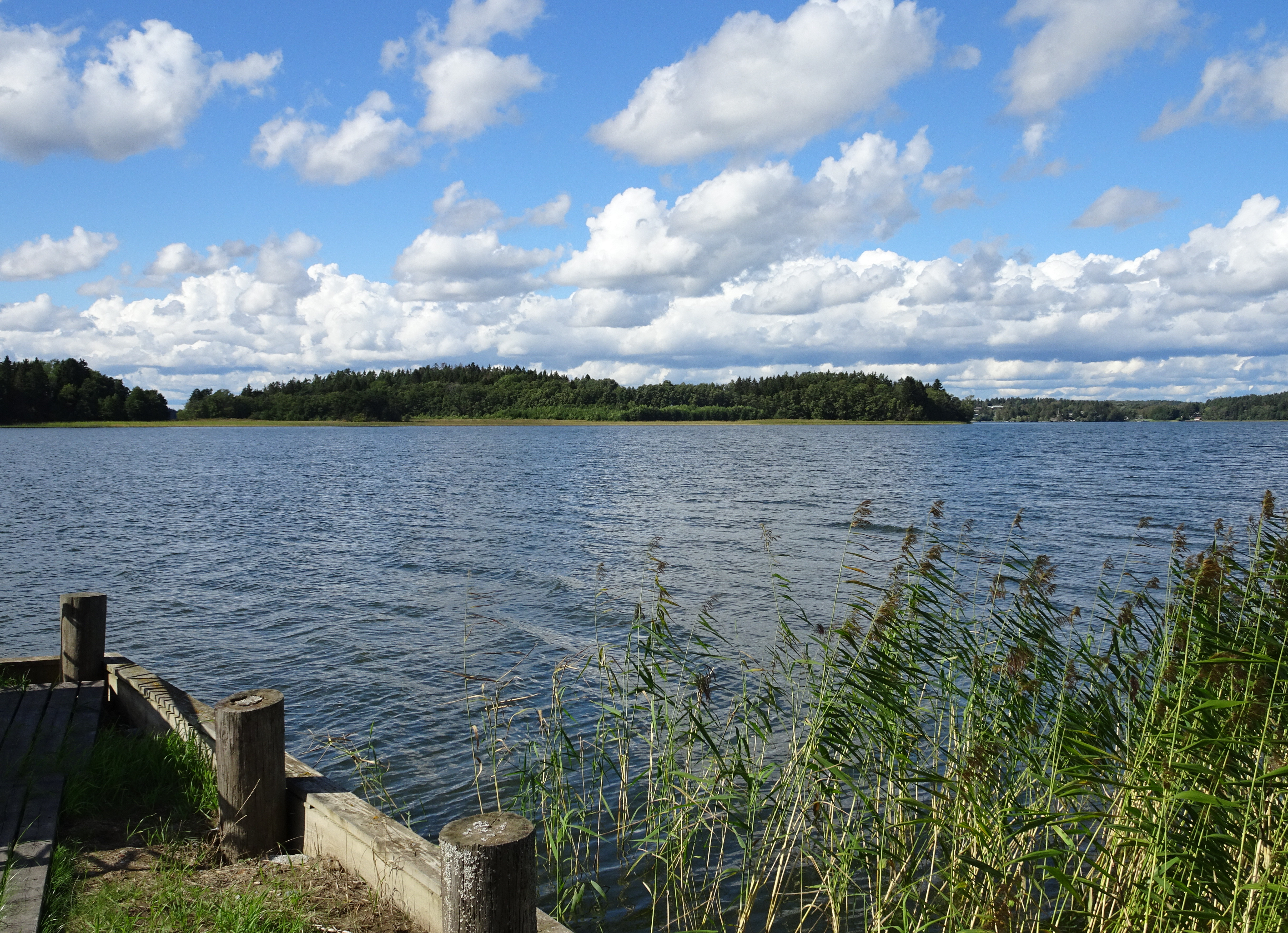 Ön Svalgarn i Norra Björkfjärden sedd från Sjö herrgård i Upplands-Bro